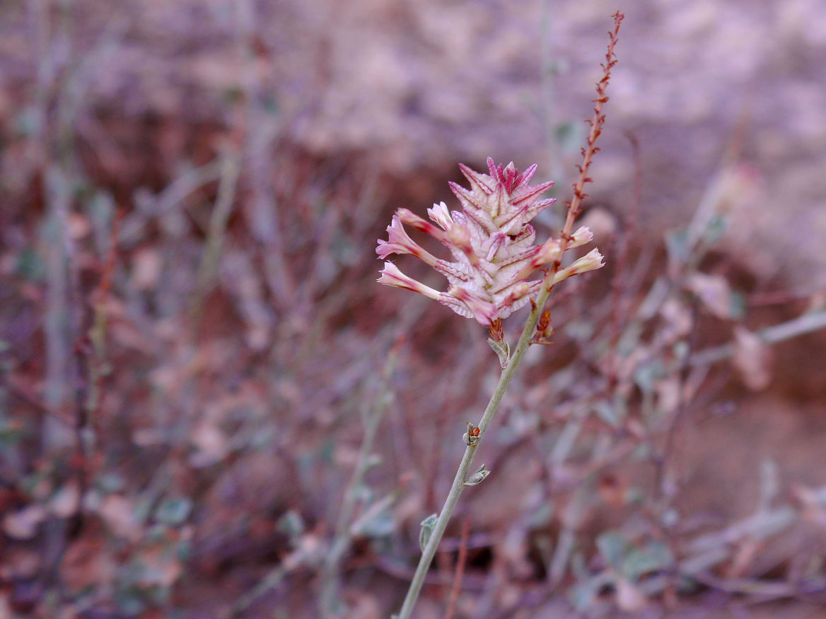 Dyerophytum africanum in Vogelfederberg (Namibia).